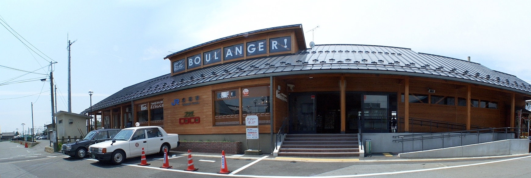 JR-WEST Torahime.sta Hokuriku Line